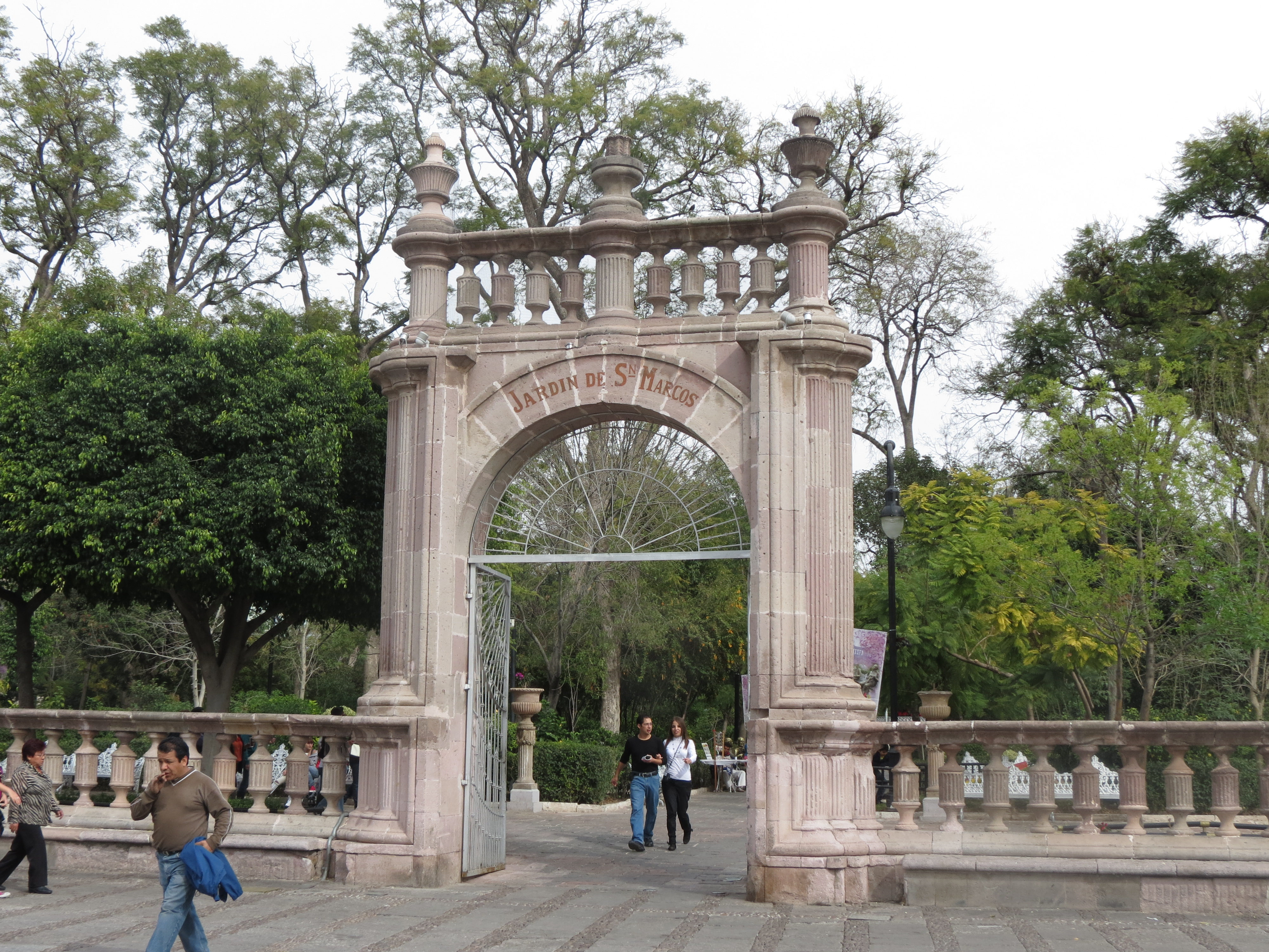 Entrada al Jardín de San Marcos